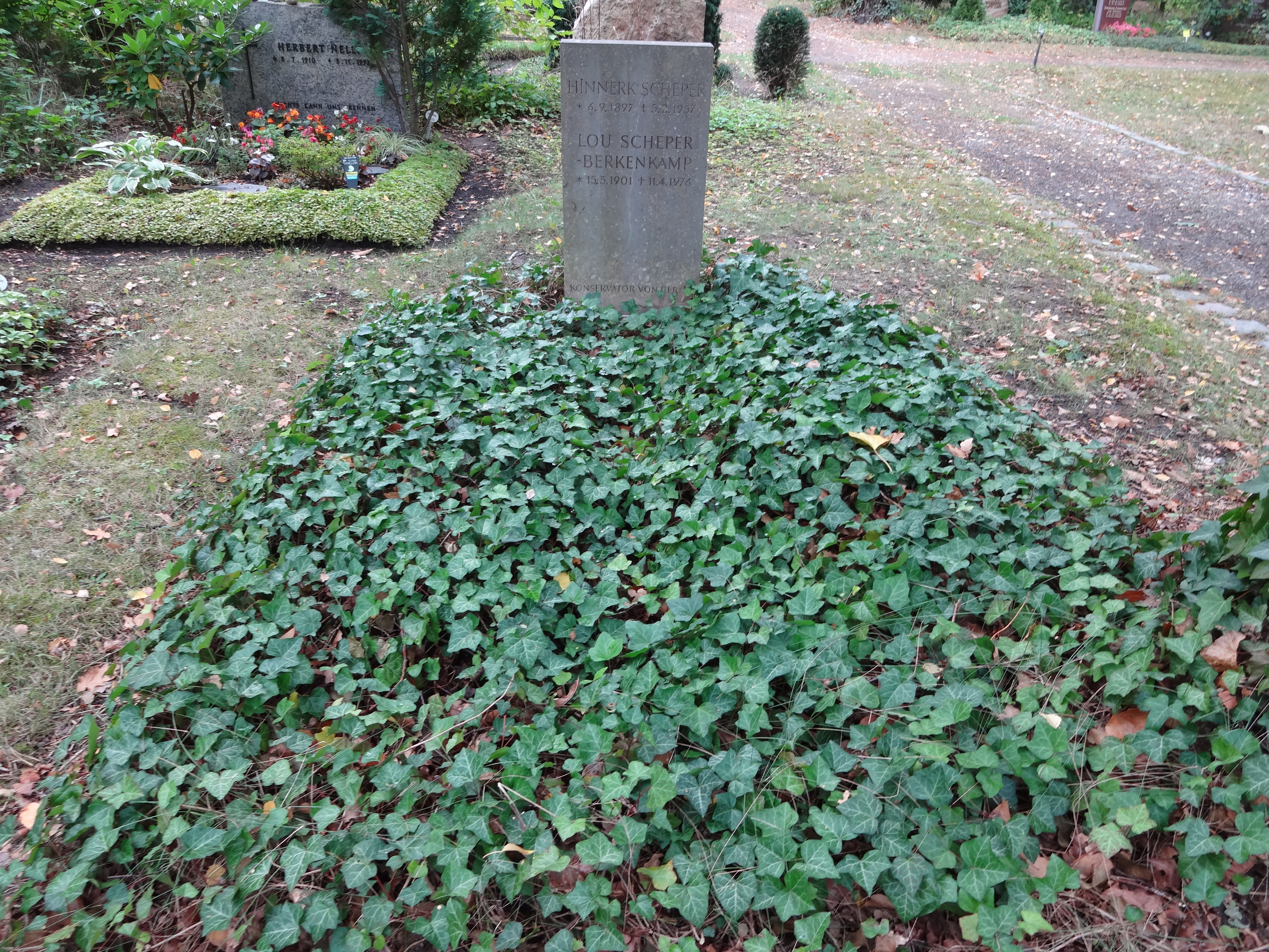 Grab von Hinnerk Scheper und Lou Scheper-Berkenkamp auf dem Waldfriedhof Zehlendorf